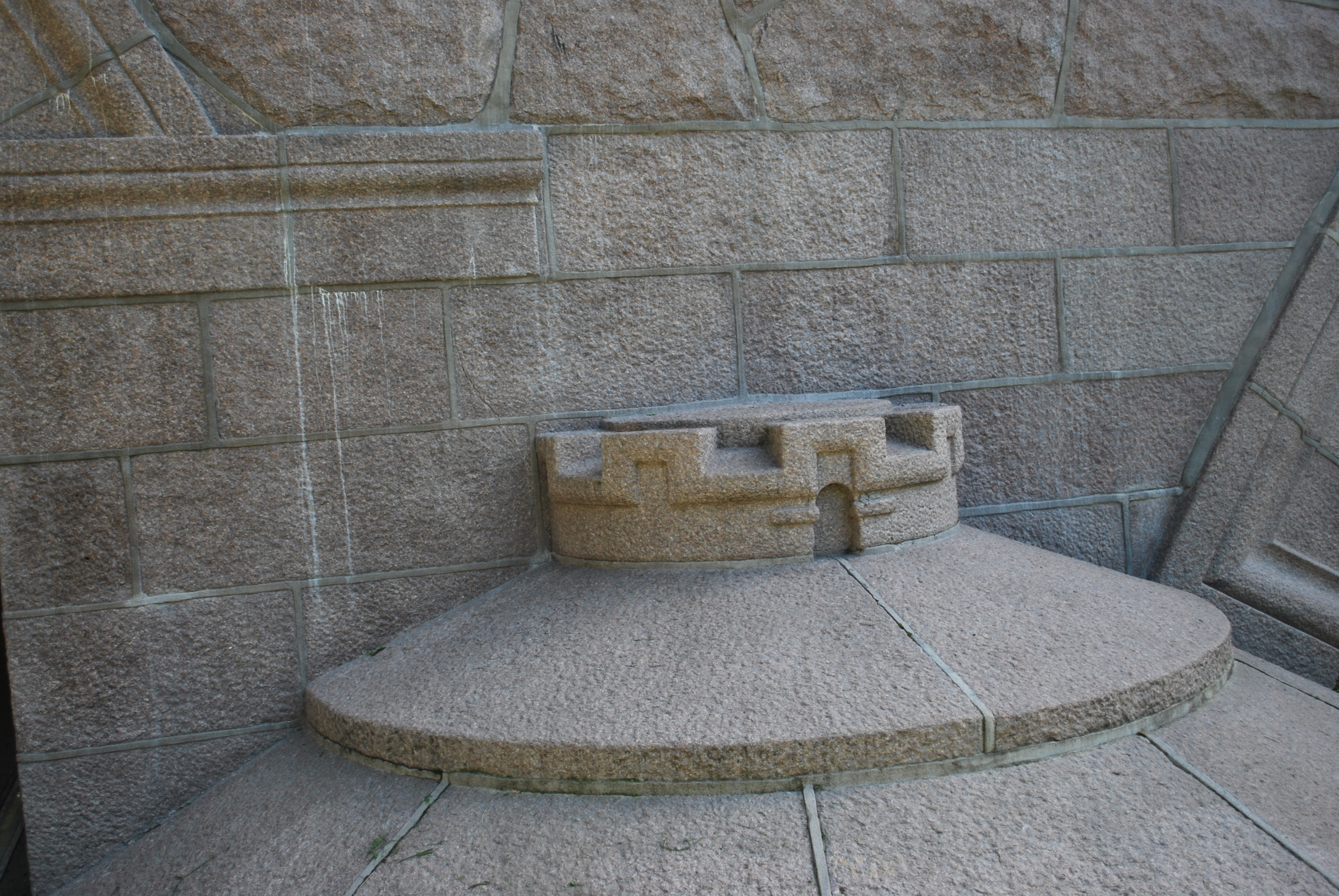 Brokar på nordbredden av Ankerbrua, mot vest. Drammensgranitt, 1926